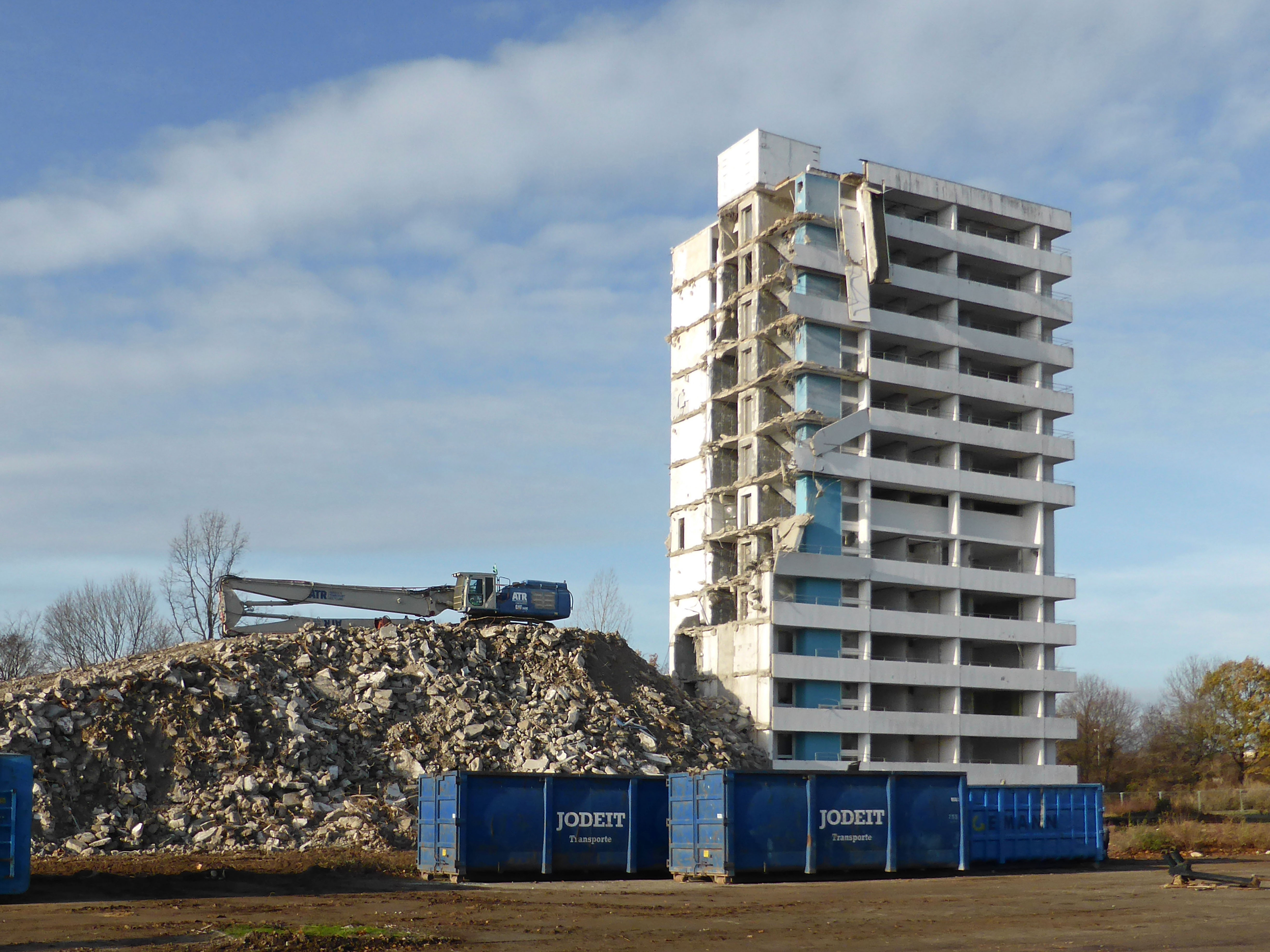 Stufenhochhaus in Wolfsburg-Detmerode beim Abriss.